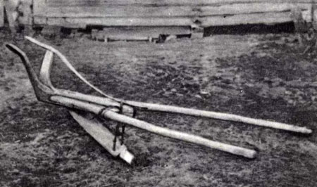 Акучнік (сошка). Вёска Капланцы Ігуменскага павета. 1904 год